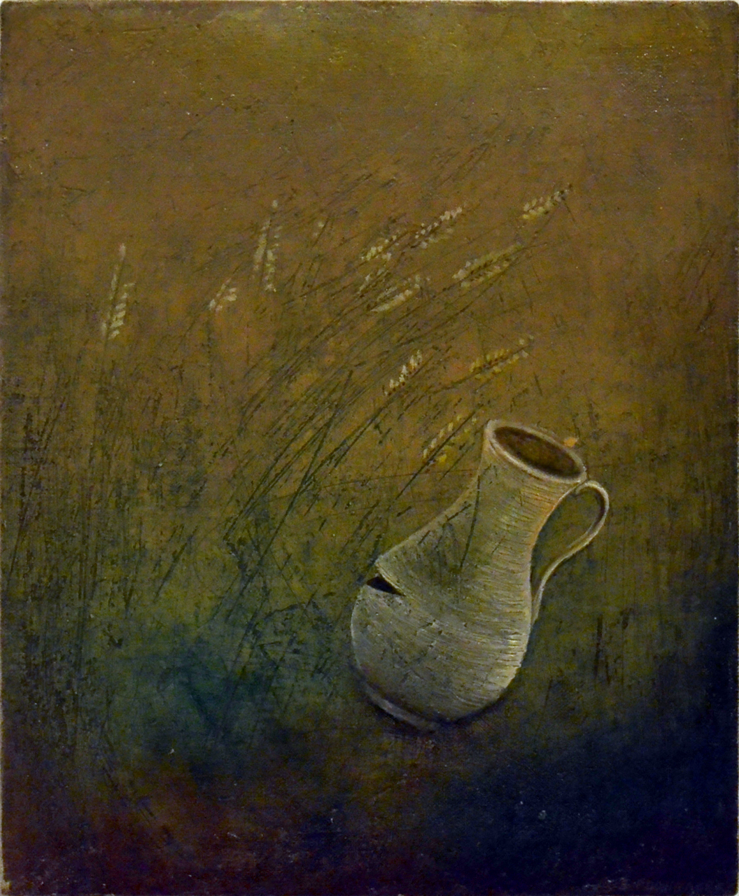 Stanislav Podhrázský, Džbán (1971)